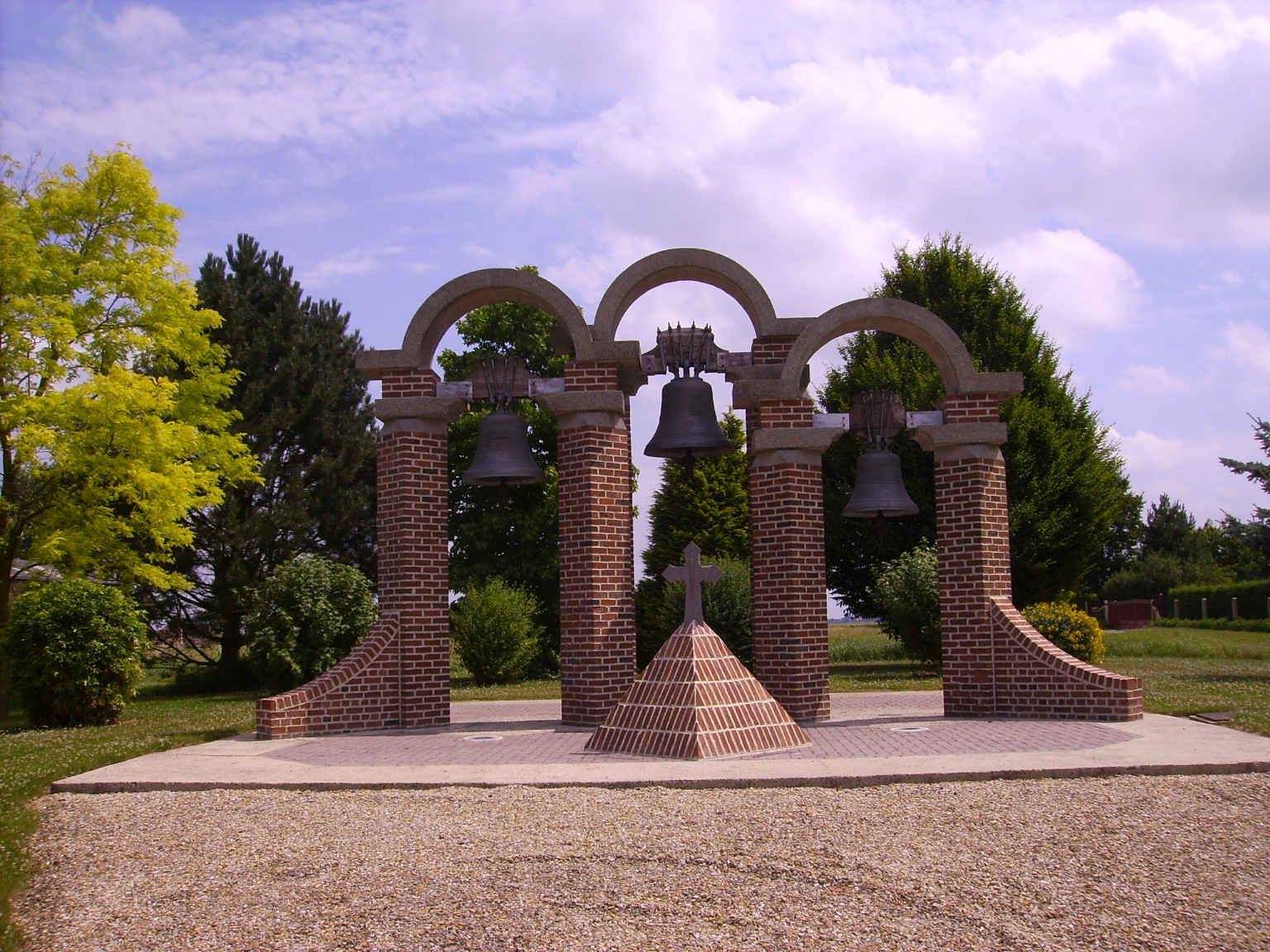 Église de Morval